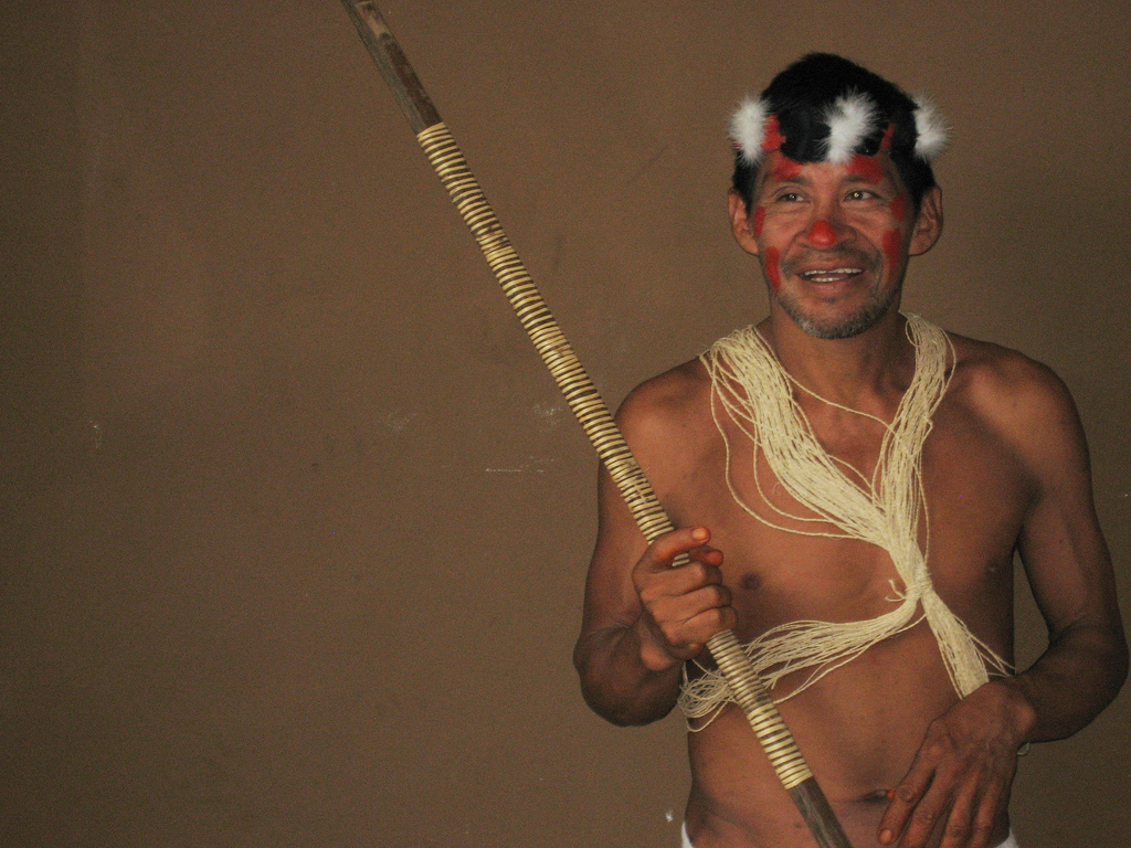 Ecuador, May 2008.